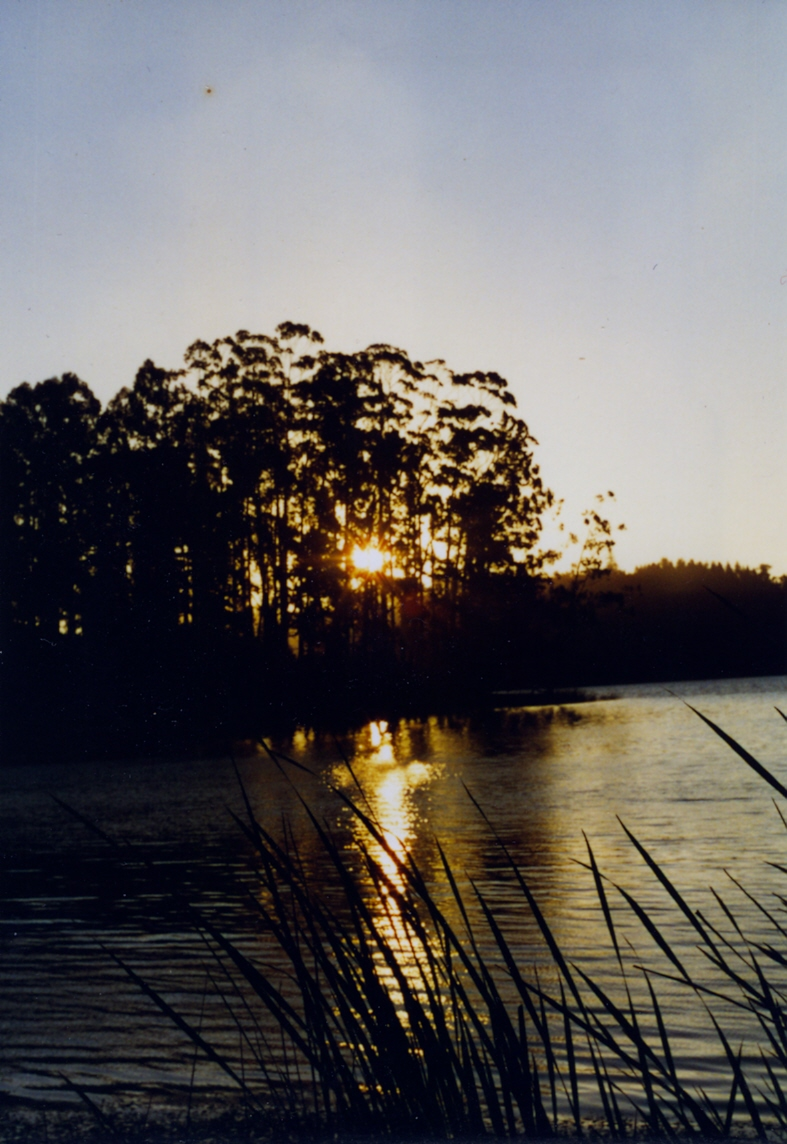 Laguna Grande de San Pedro. San Pedro de La Paz, Concepción. Chile. La fotografía fue tomada en 1996 por Jcestepario y fue escaneada en octubre de 2007. Muestra la puntilla ubicada debajo de actual sector Andalué, desde el costado nor-oeste de la laguna.